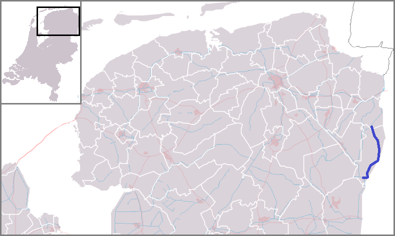 Afgeleid van